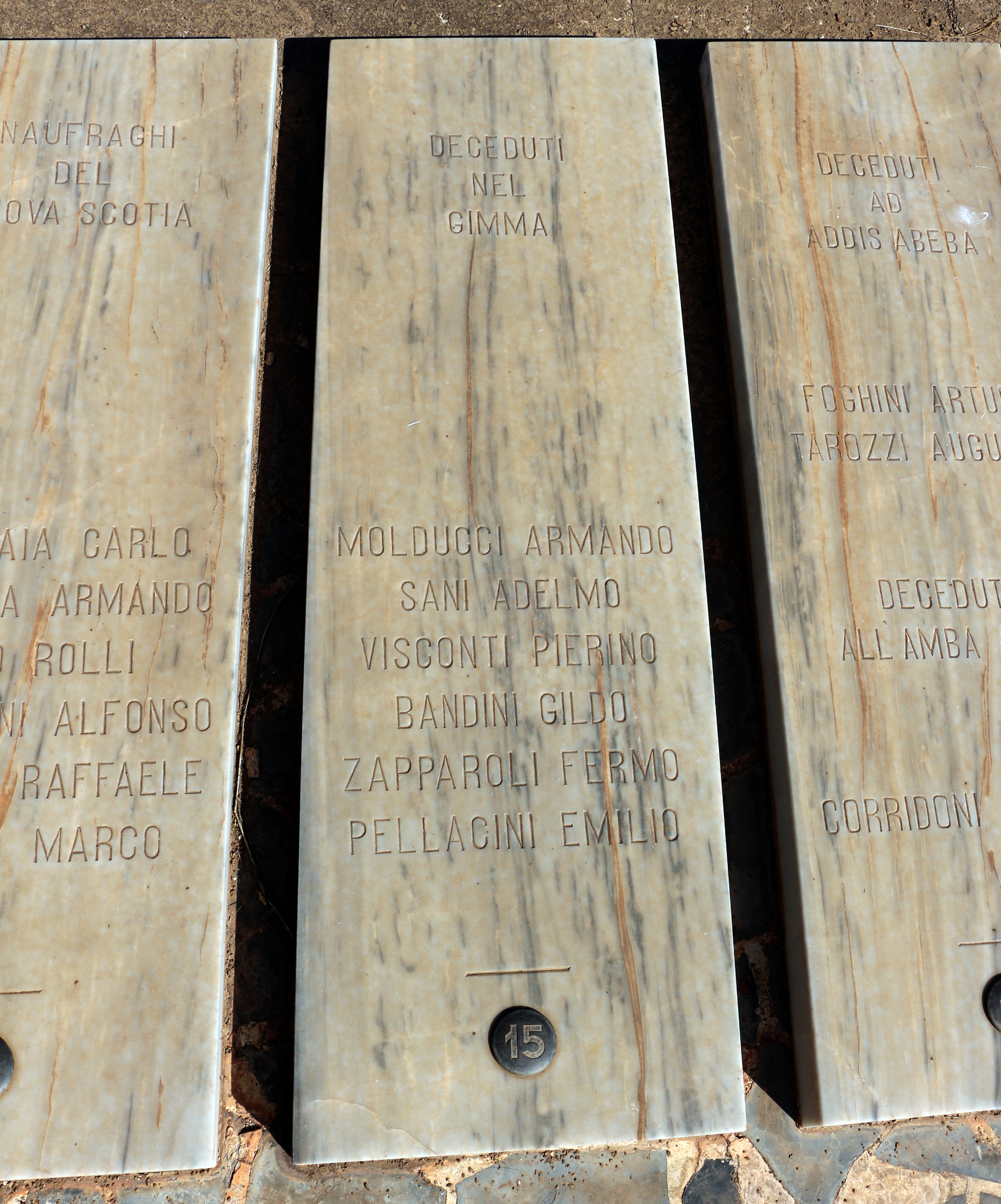 Cimitero italiano di asmara, memoriale caduti dell'agip, 04 deceduti nel gimma.JPG